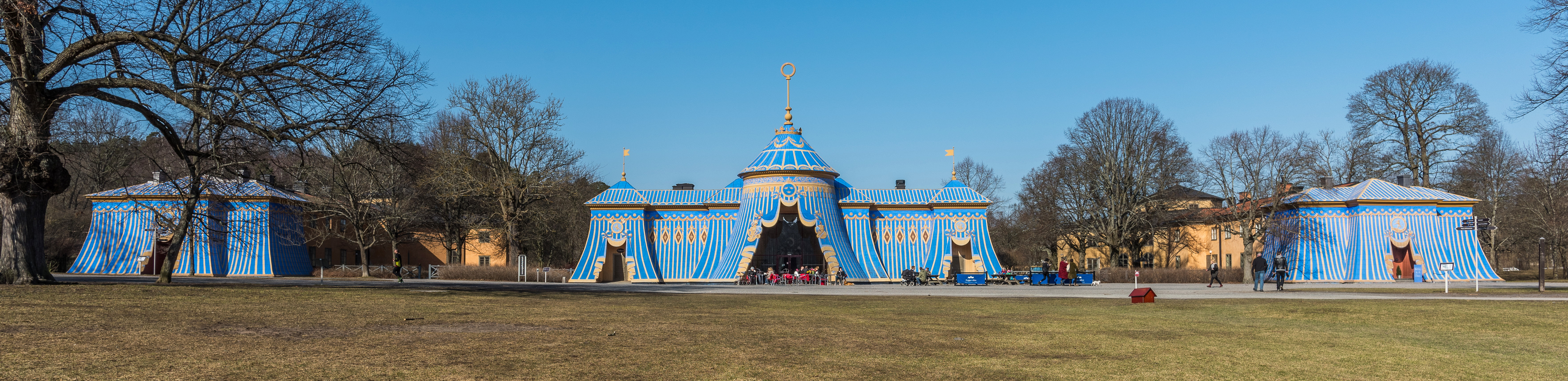 Koppartälten i Hagaparken